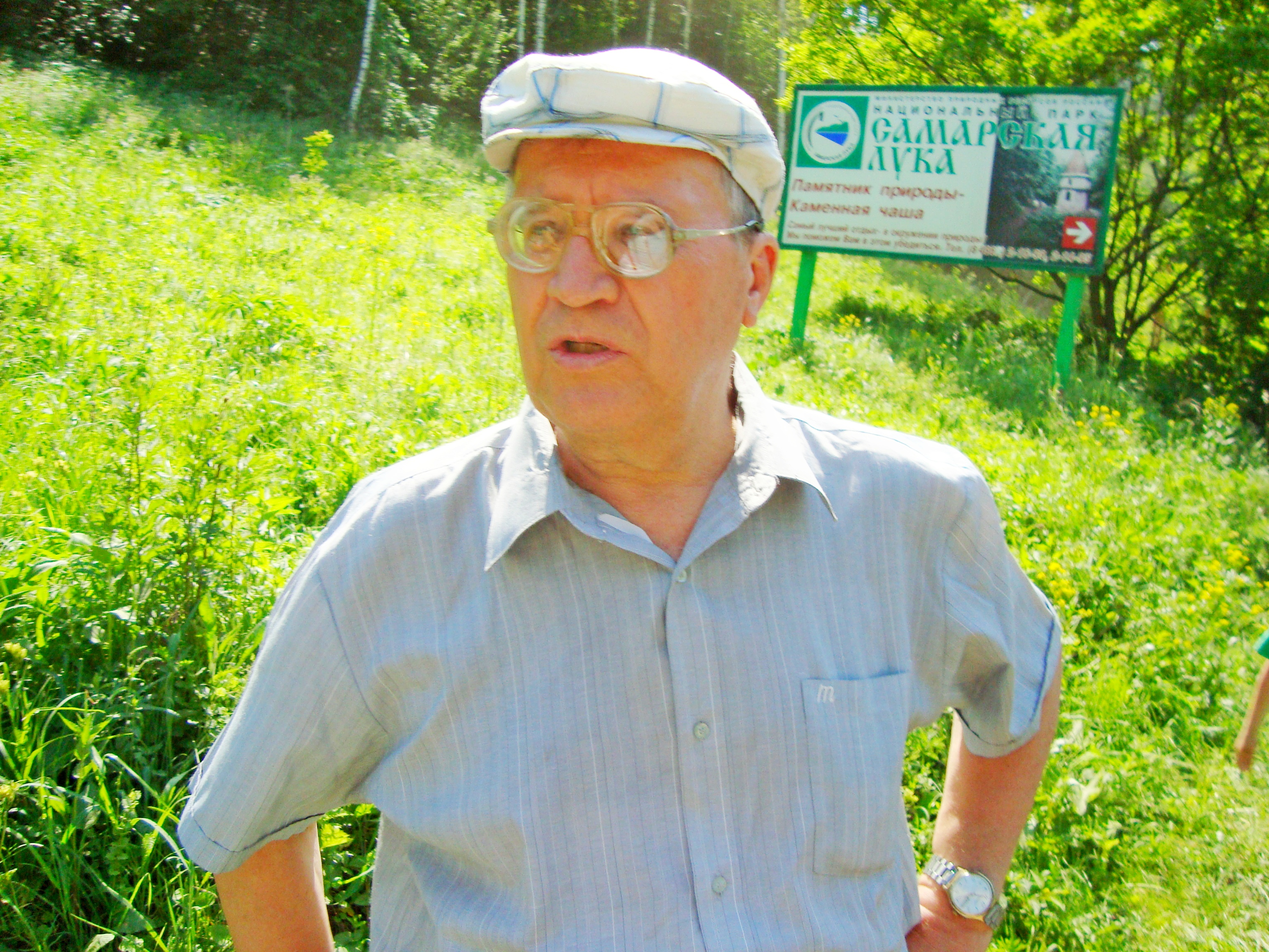 Профессор Н.М.Матвеев,2012